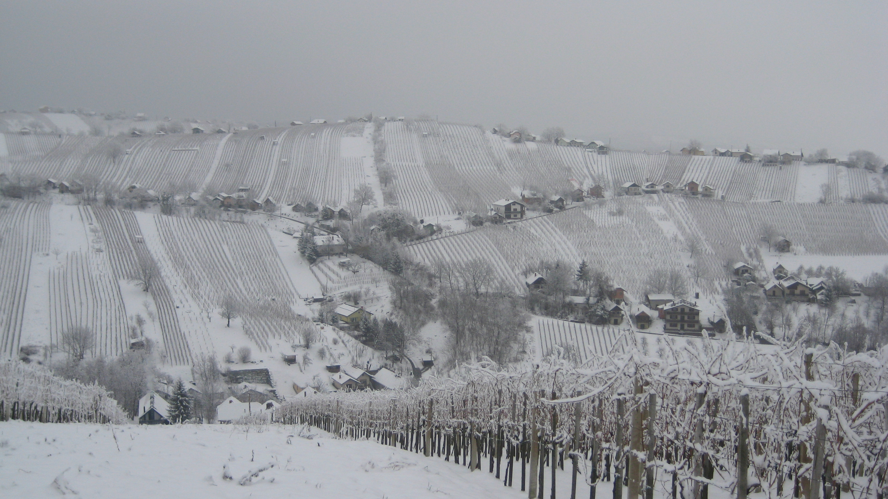 Lendavske gorice, wine region near Lendava, Slovenia